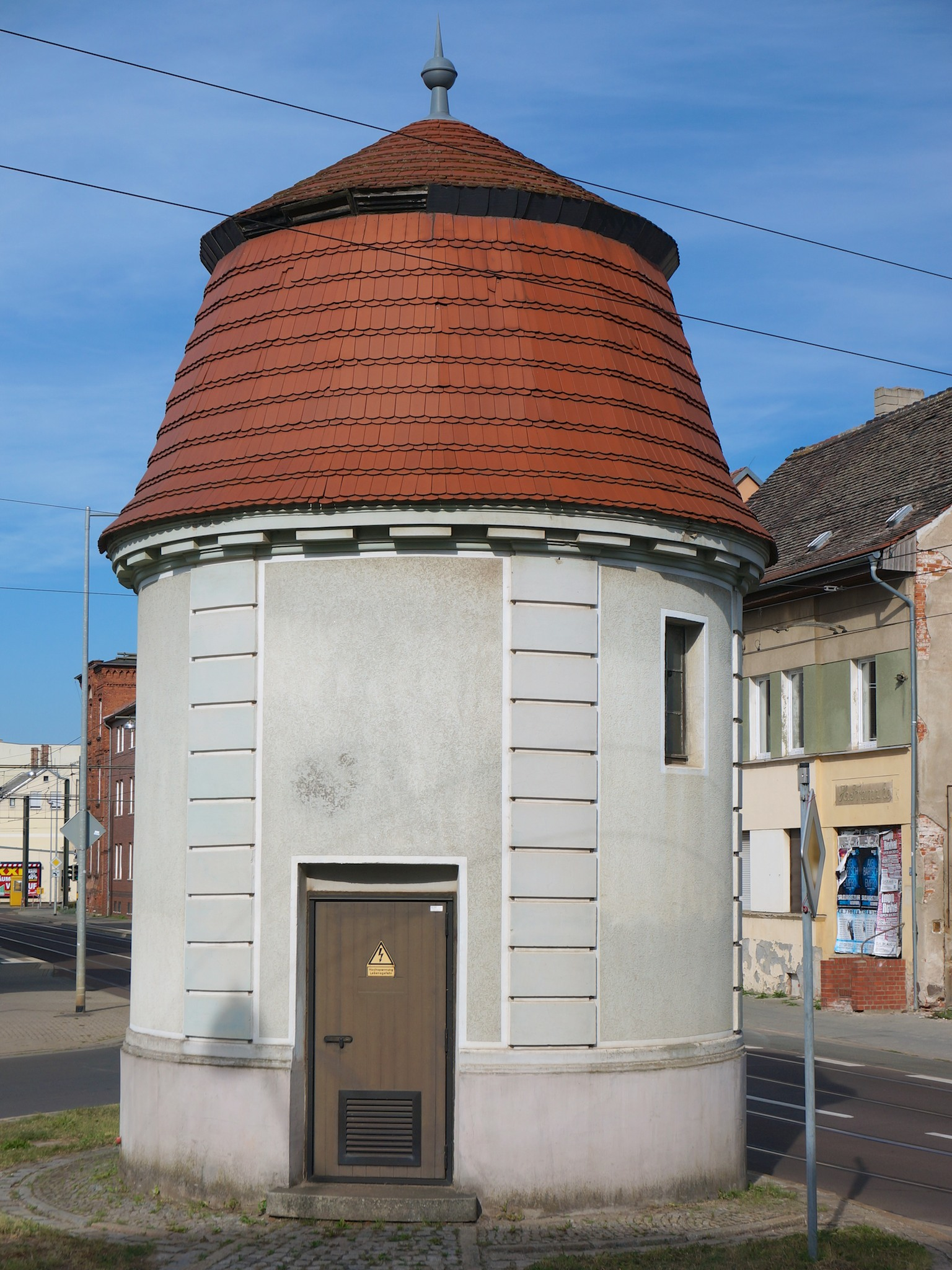 Transformatorenstation Pfeifferstraße (Kulturdenkmal in Magdeburg)